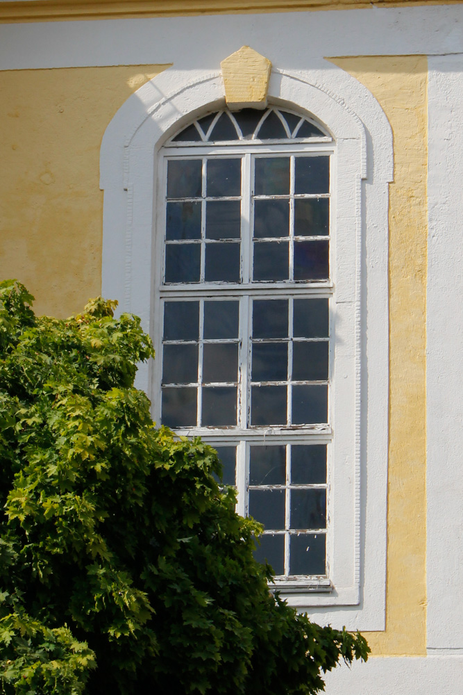 Kirche in Kayna, Zeitz, Burgenlandkreis, Sachsen-Anhalt, Deutschland